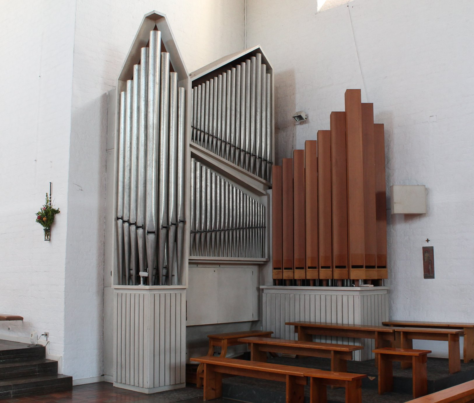 Orgel von St. Klara in München-Zamdorf